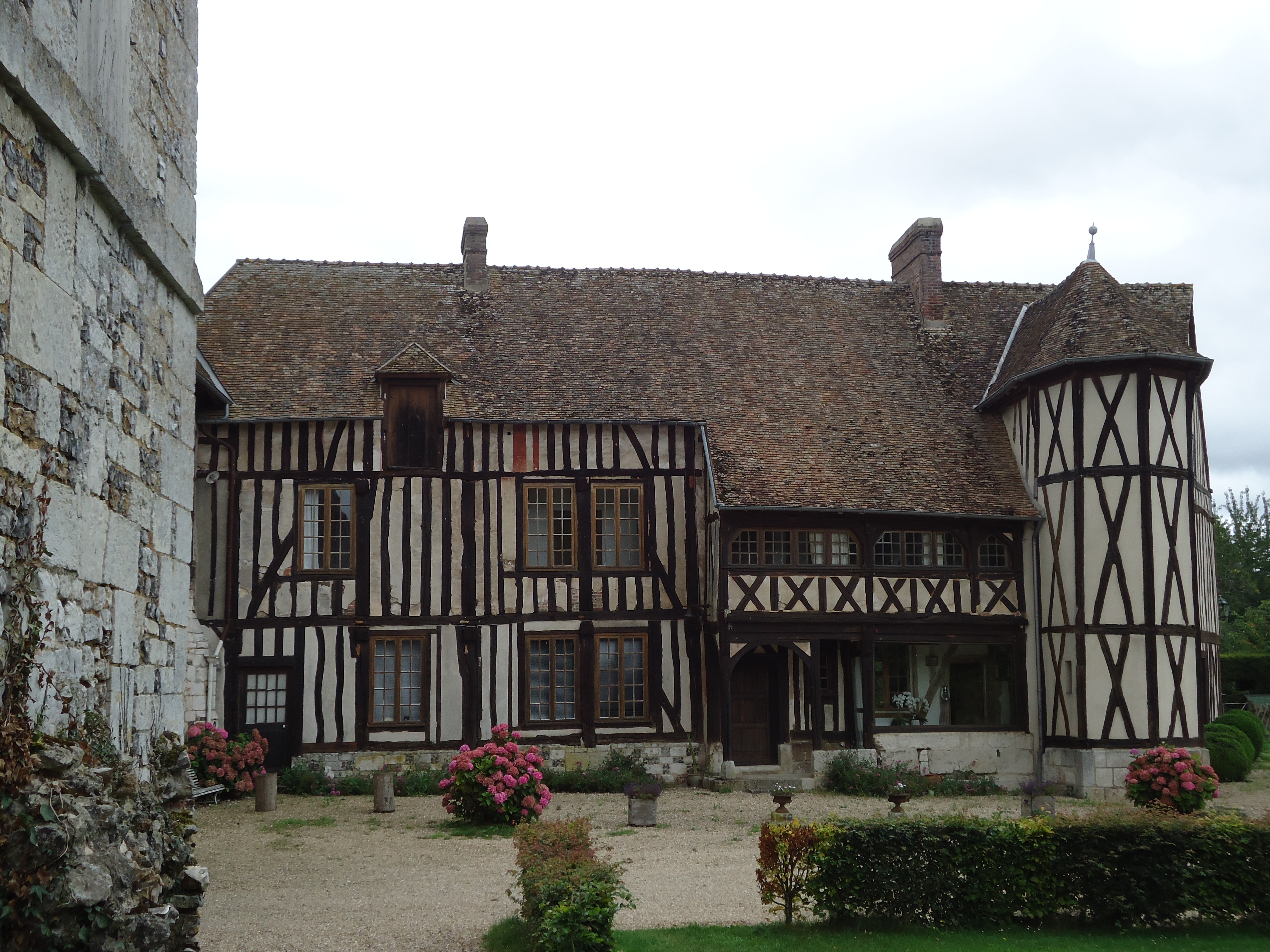 Le Mesnil-Jourdain - Ferme du Manoir XVIe & XVIIe (Part ISMH)